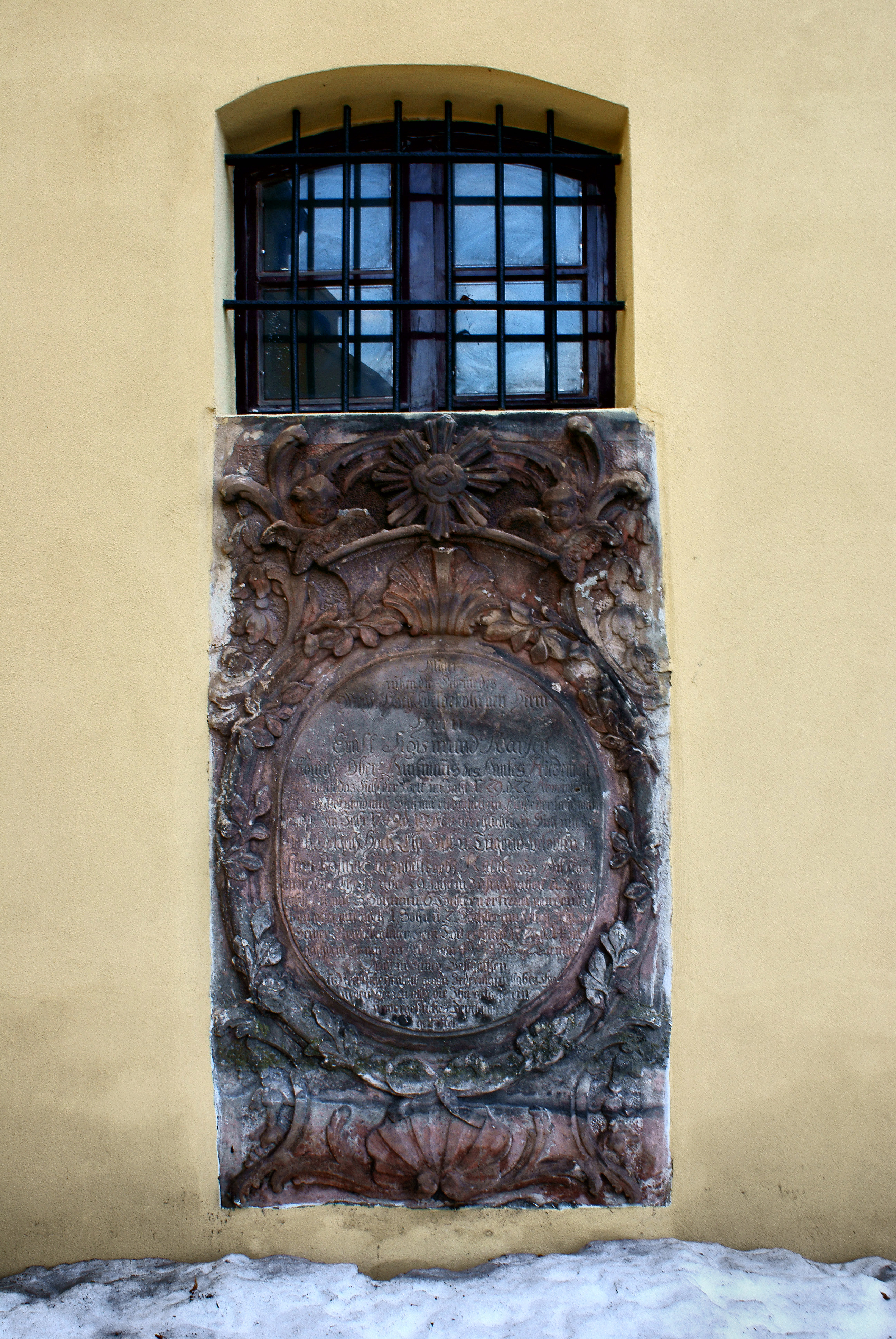 Grębocice - kościół parafialny św. Marcina (zabytek nr rejestr. A/1629/122)